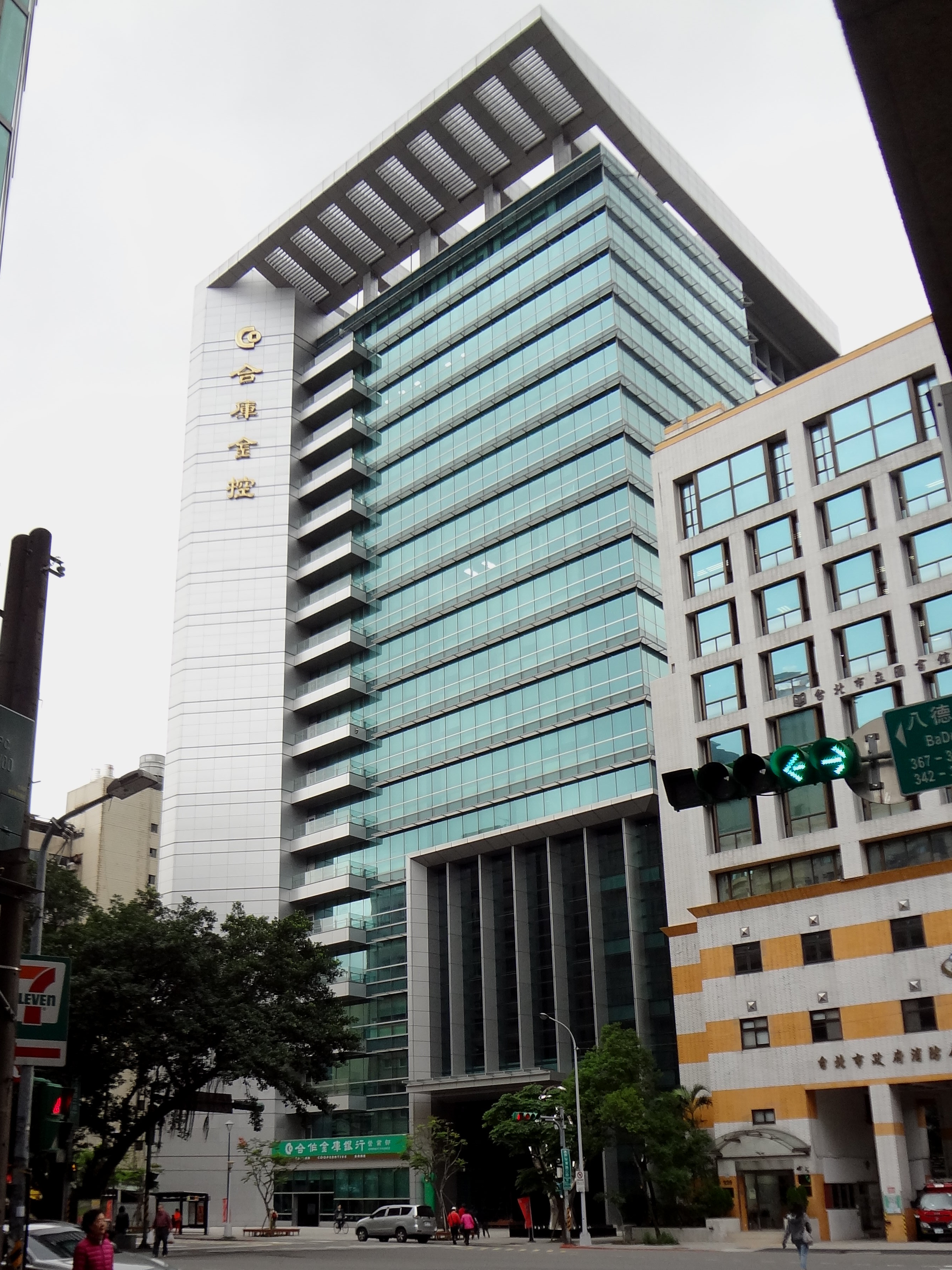 合庫金控暨合作金庫商業銀行總行大樓，位於臺北市松山區長安東路二段225號。